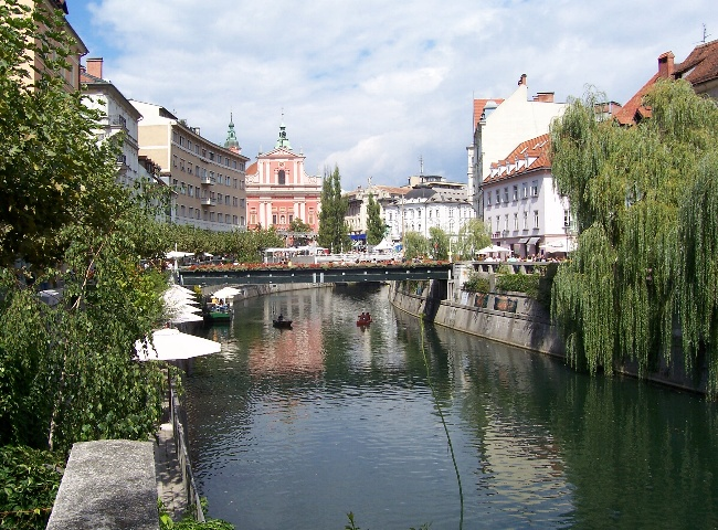 Lubiana centro lungo il fiume